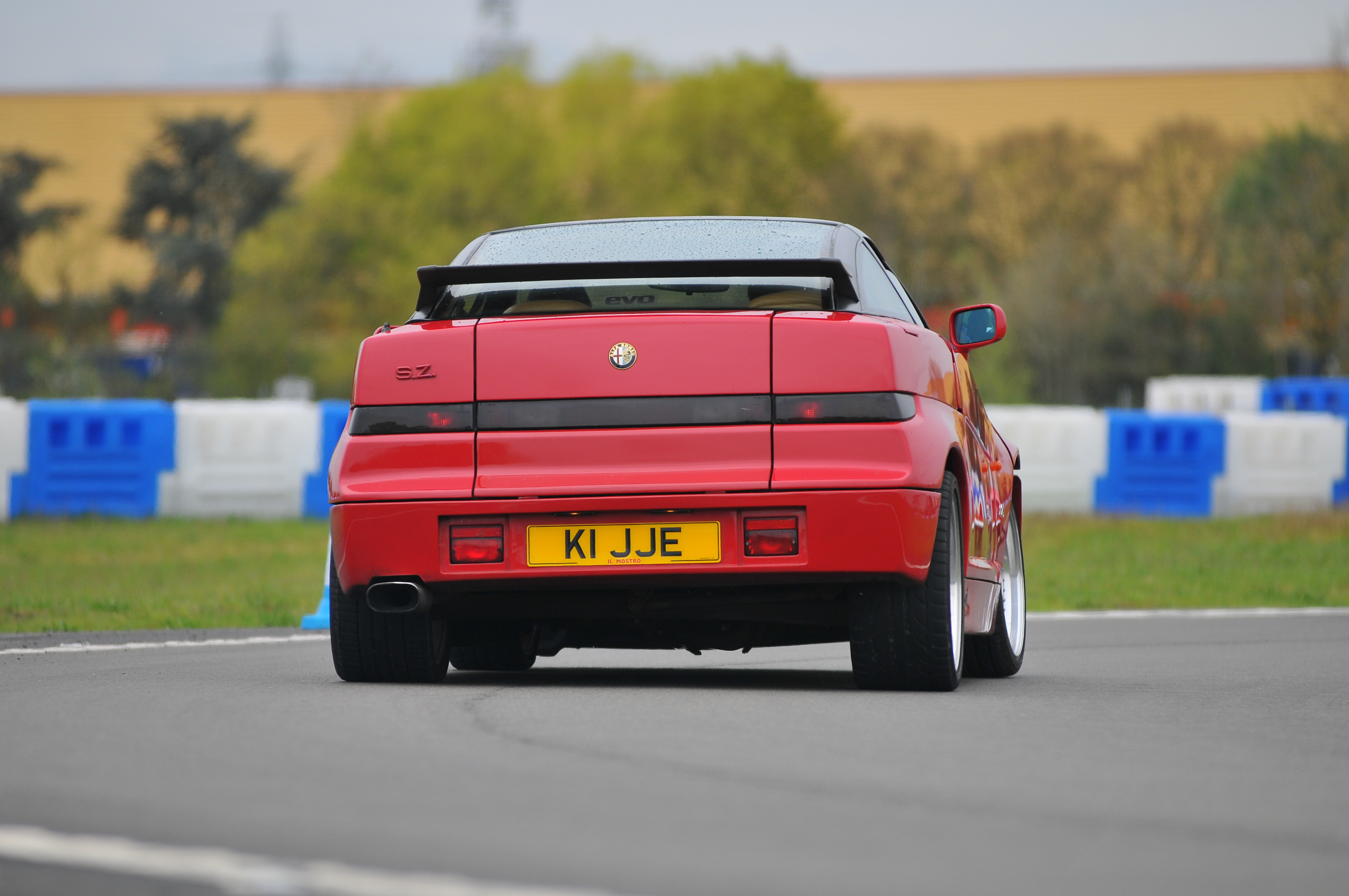 AutoItalia Brooklands May 2012